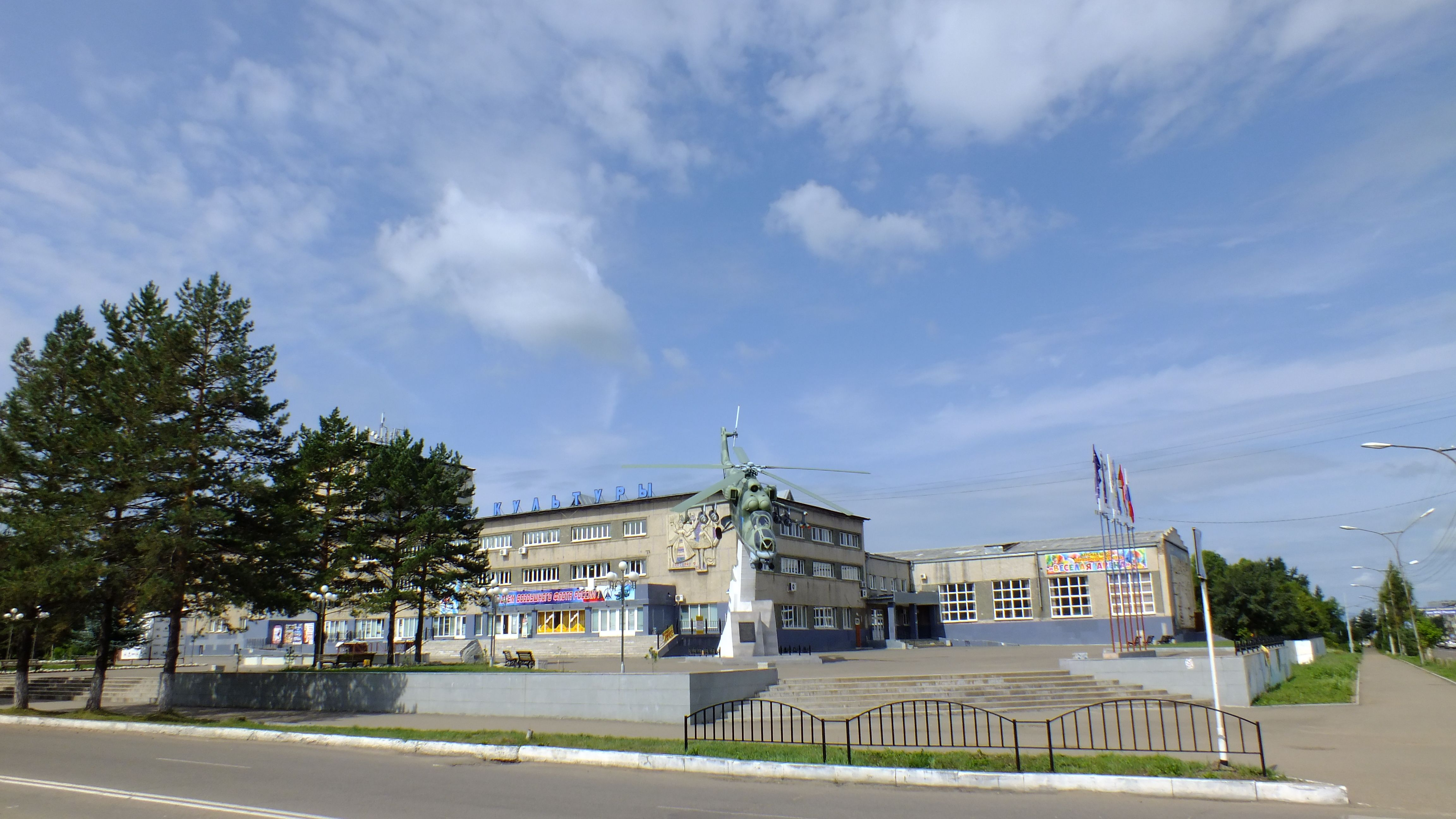 Город Арсеньев вертолет Ми-24 перед ДК завода Прогресс